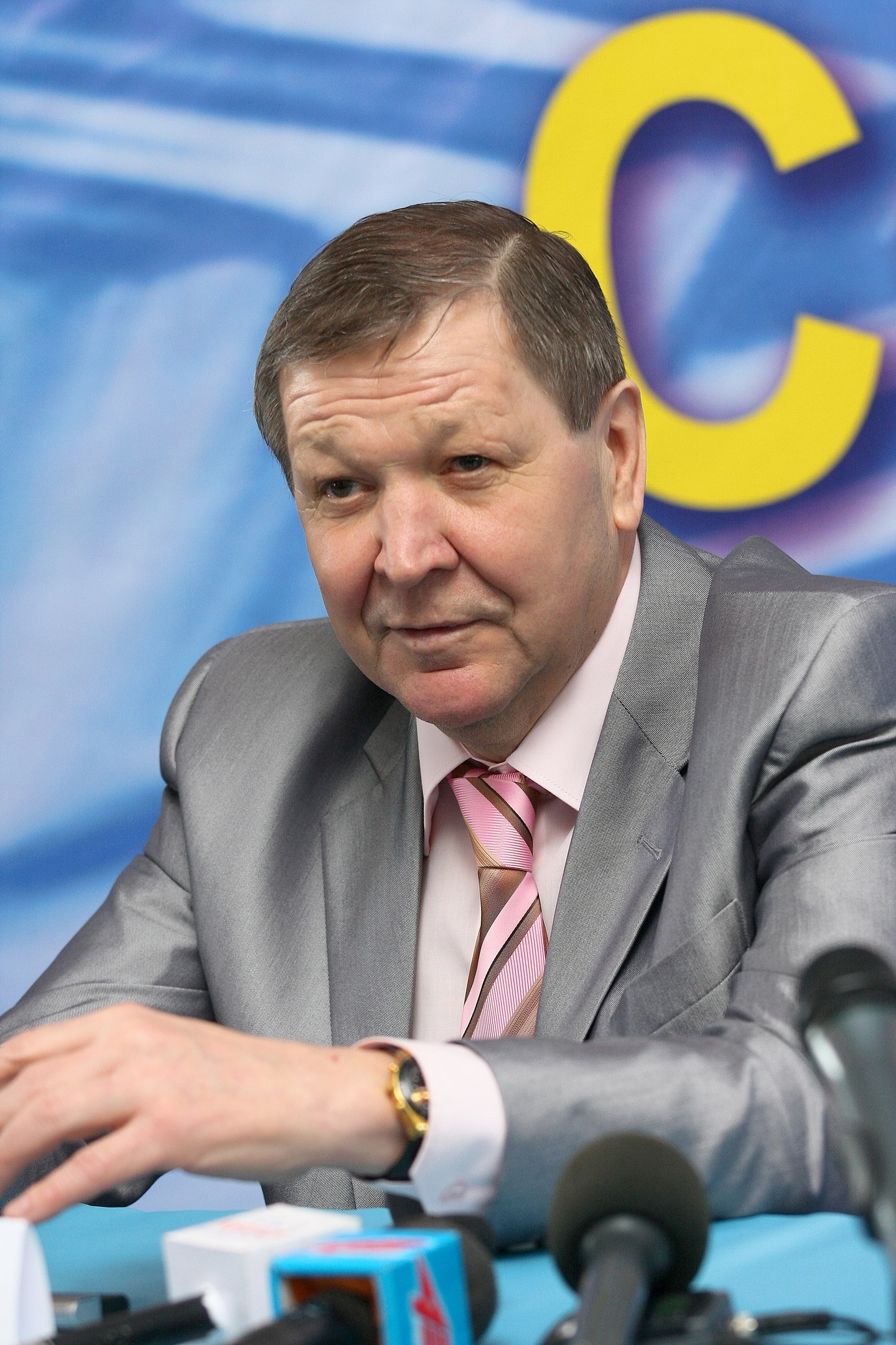 Александр Николаевич Мальцев